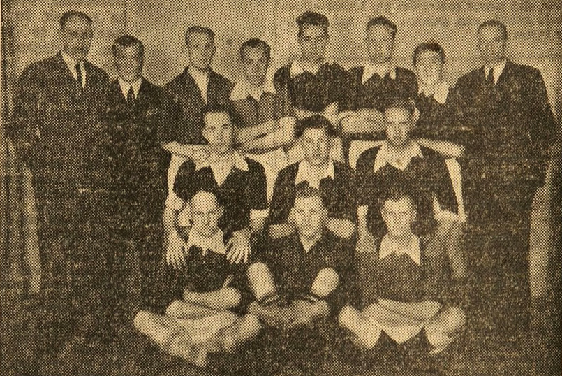 Het voetbalteam van SV Watervogels in 1946. Van links naar rechts achterste rij: Voorzitter van Doorn, Van der Wal (grensrechter), V.Beckhoven, J.Snijders, G.Snijders, H.Been, Schoneveld en Fr.Been (bestuurslid); midden: Gerritse, Van de Hert en S.Been; voorste rij: Kuiper, Dirks en Schotting. De ploeg werd het seizoen 1945/46 ongeslagen kampioen van de 4e klasse A van de KNVB.